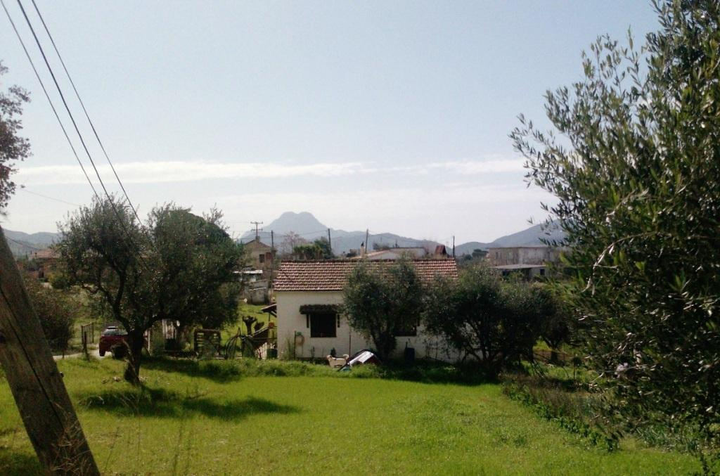 Κουνελαίικα Αχαΐας